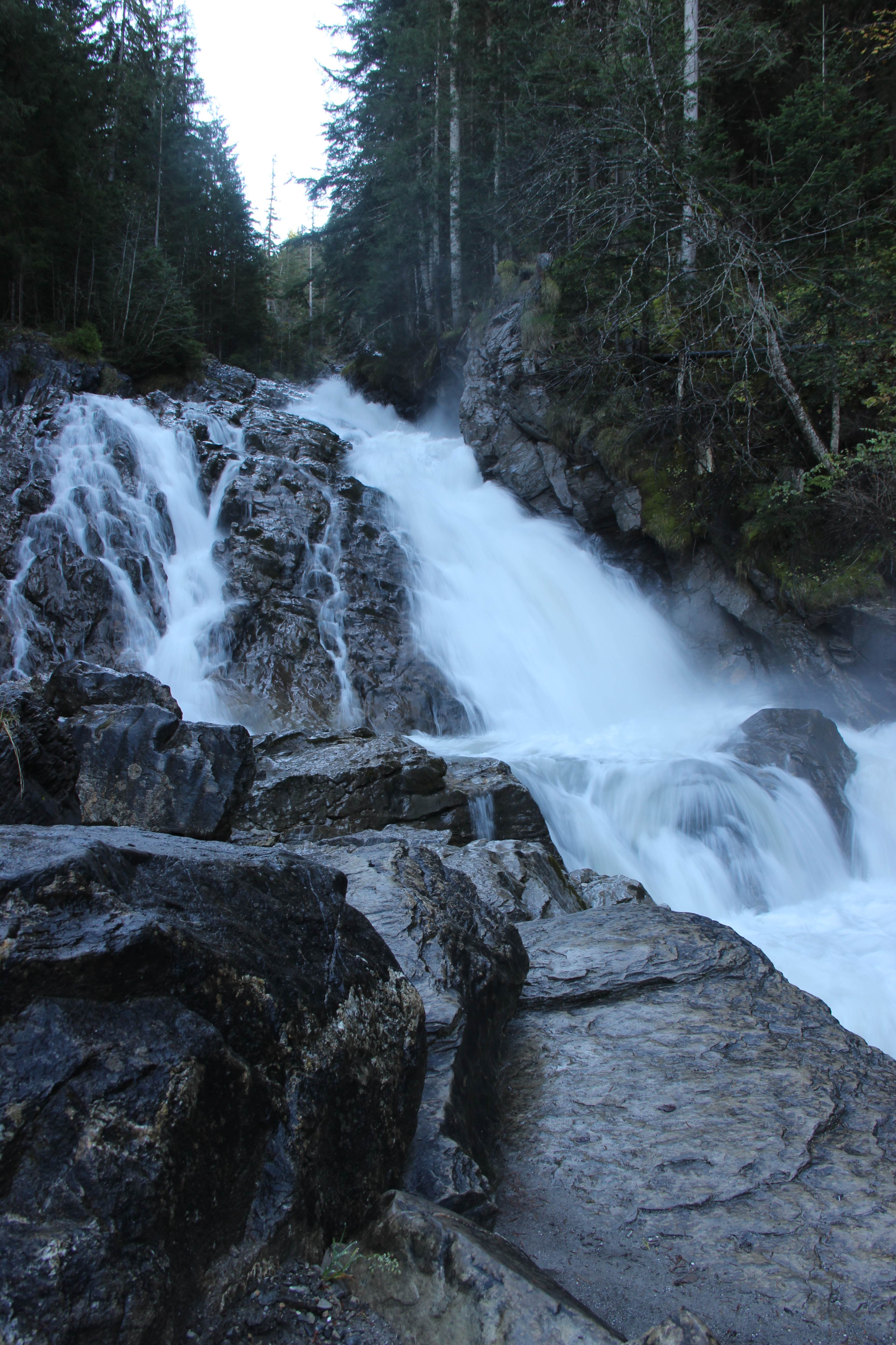 Simmenfälle